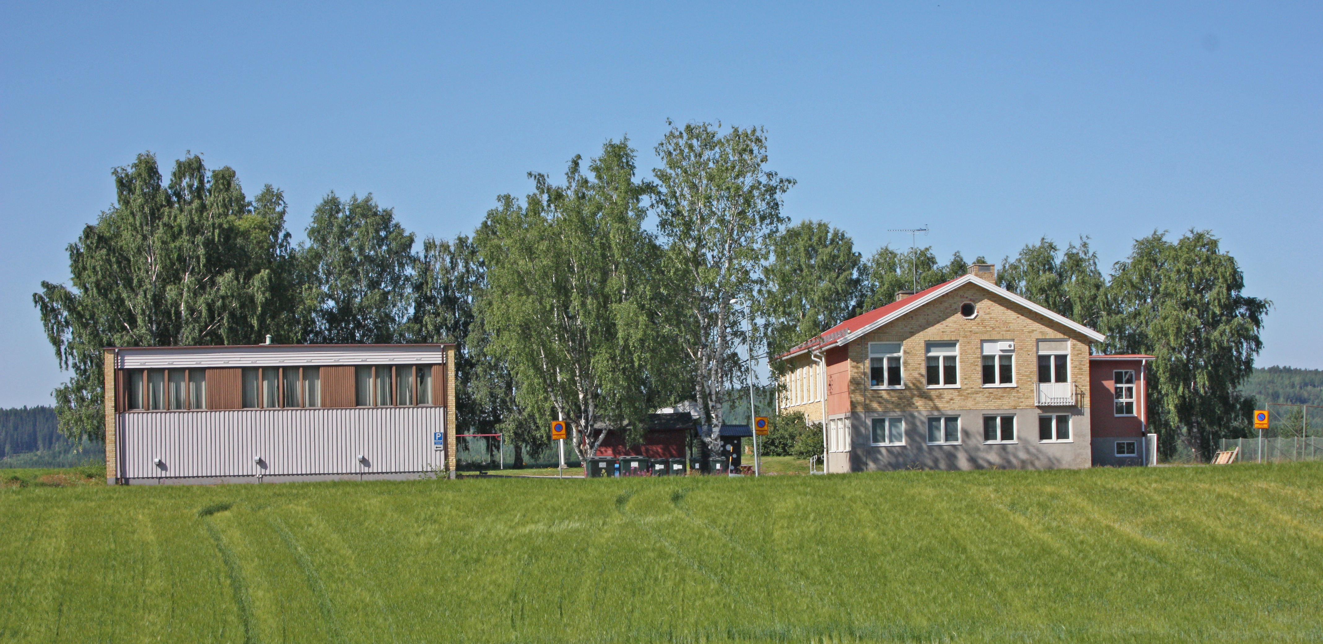 Skolan och gymnastiksalen i Rödåsel